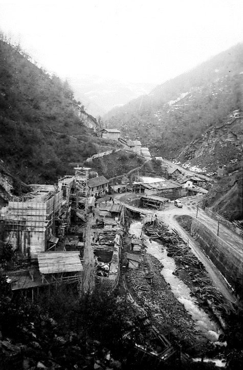 Изградње постројења Хидоцентрале Врла I, 1952. године